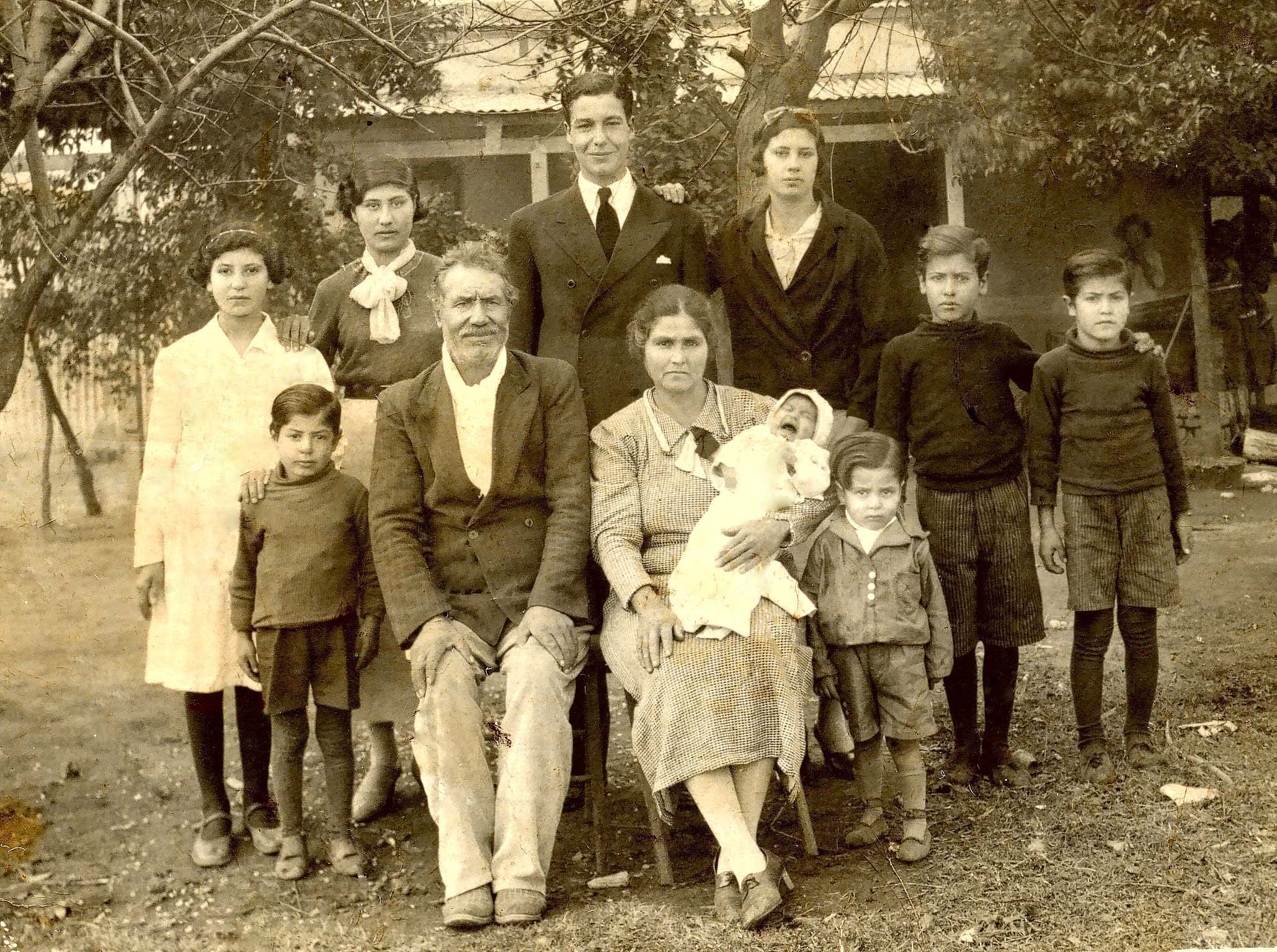 Inmigrantes españoles en el pueblo de Arias, provincia de Córdoba, Argentina.